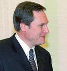 Ausschnitt aus File:Vladimir Putin 16 January 2001-6.jpg. Dumitru Braghis, moldawischer Politiker.